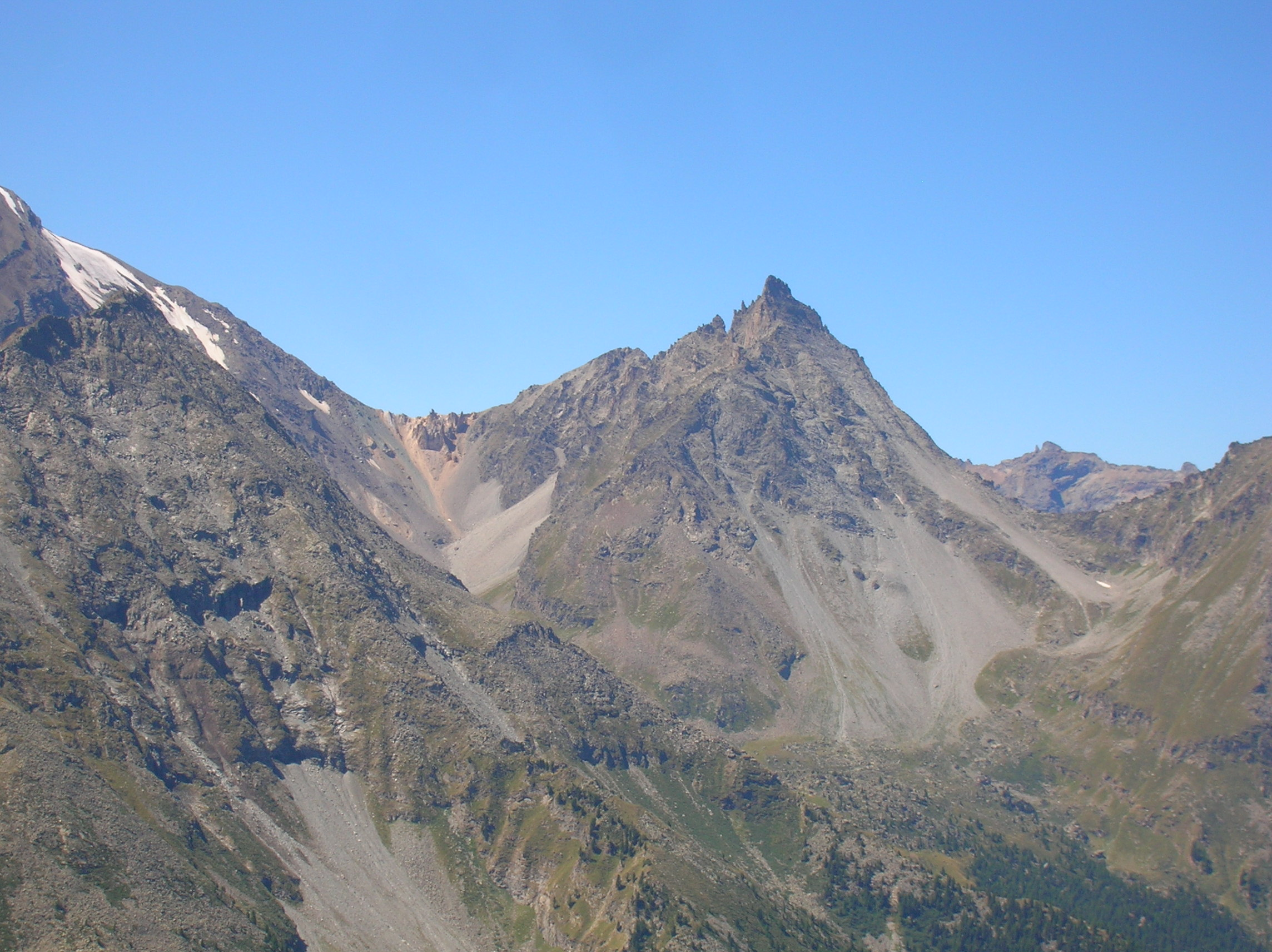 Grand Nomenon Dal belvedere della Piatta di Grevon. Pila (Gressan), Valle d'Aosta, Italia.